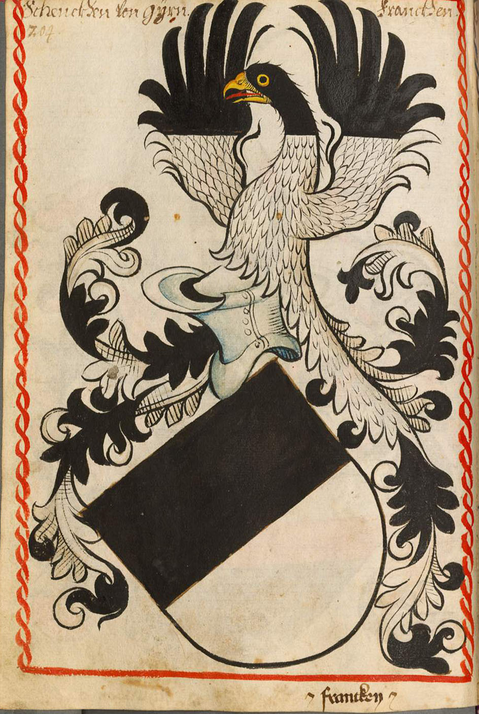 Scheibler'sches Wappenbuch , älterer Teil Geyern